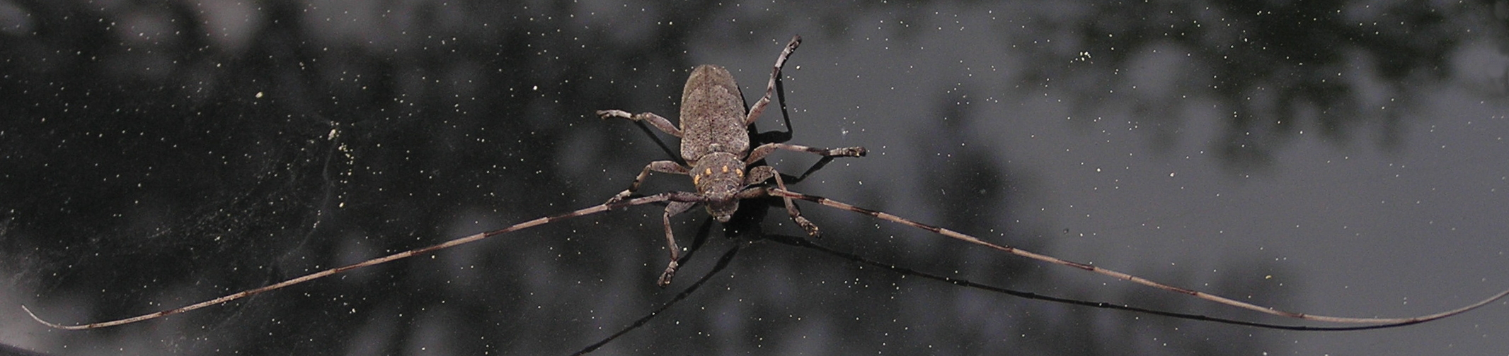 Acanthocinus aedilis, Tycz cieśla, Białowieża, Polska